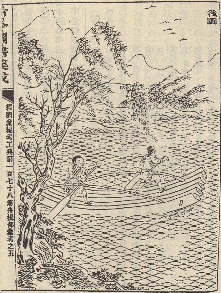 竹筏圖，重繪自《三才圖會》。